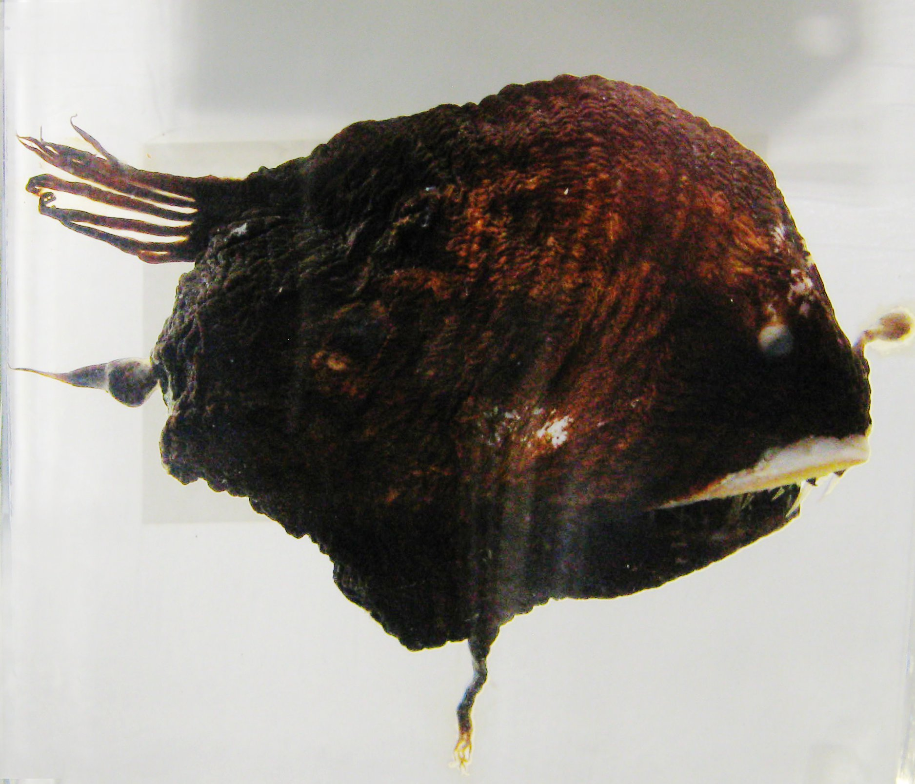 Anglerfisch